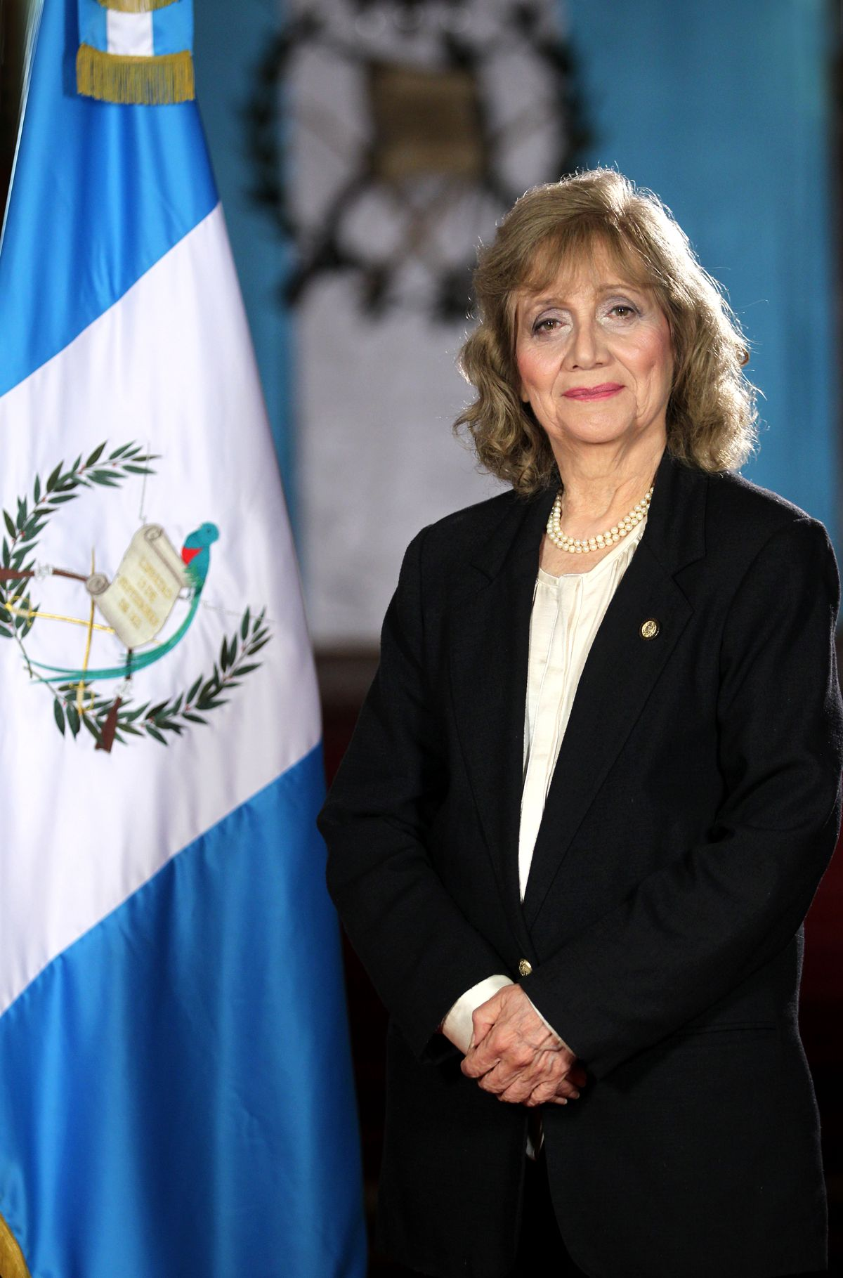 Ana Maria Rodas Ministra de Cultura y Deportes de Guatemala